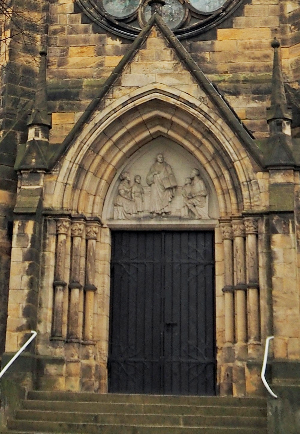 Bad Harzburg, Lutherkirche, Portal mit Tympanonrelief von Wilhelm Sagebiel Martin Luther lehrt das Volk